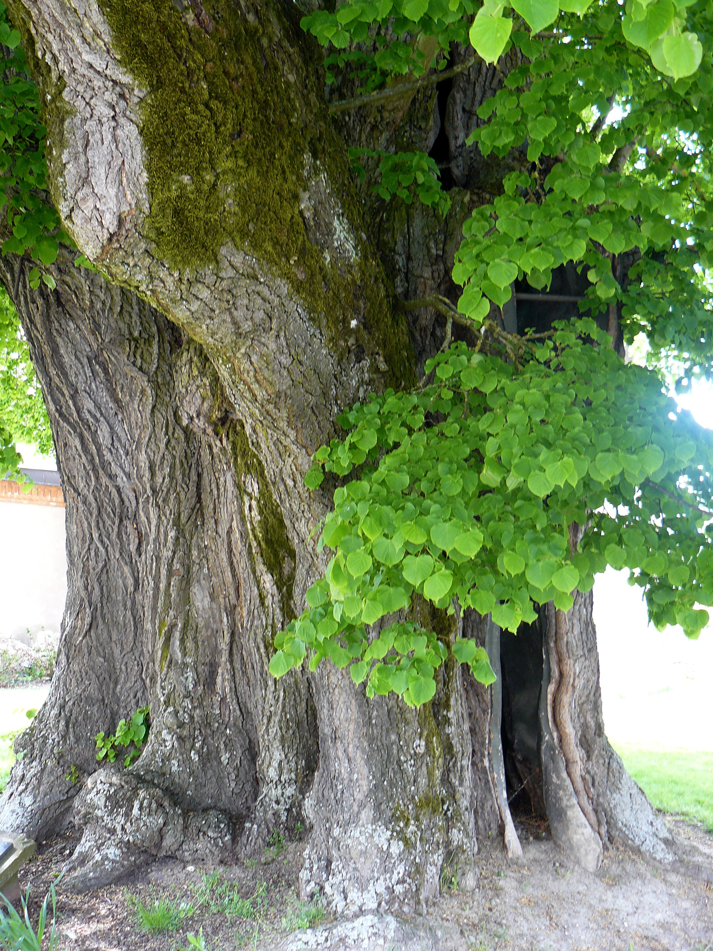 Tilleul de Turenne à Fontaine (Terr. de Belfort, France)